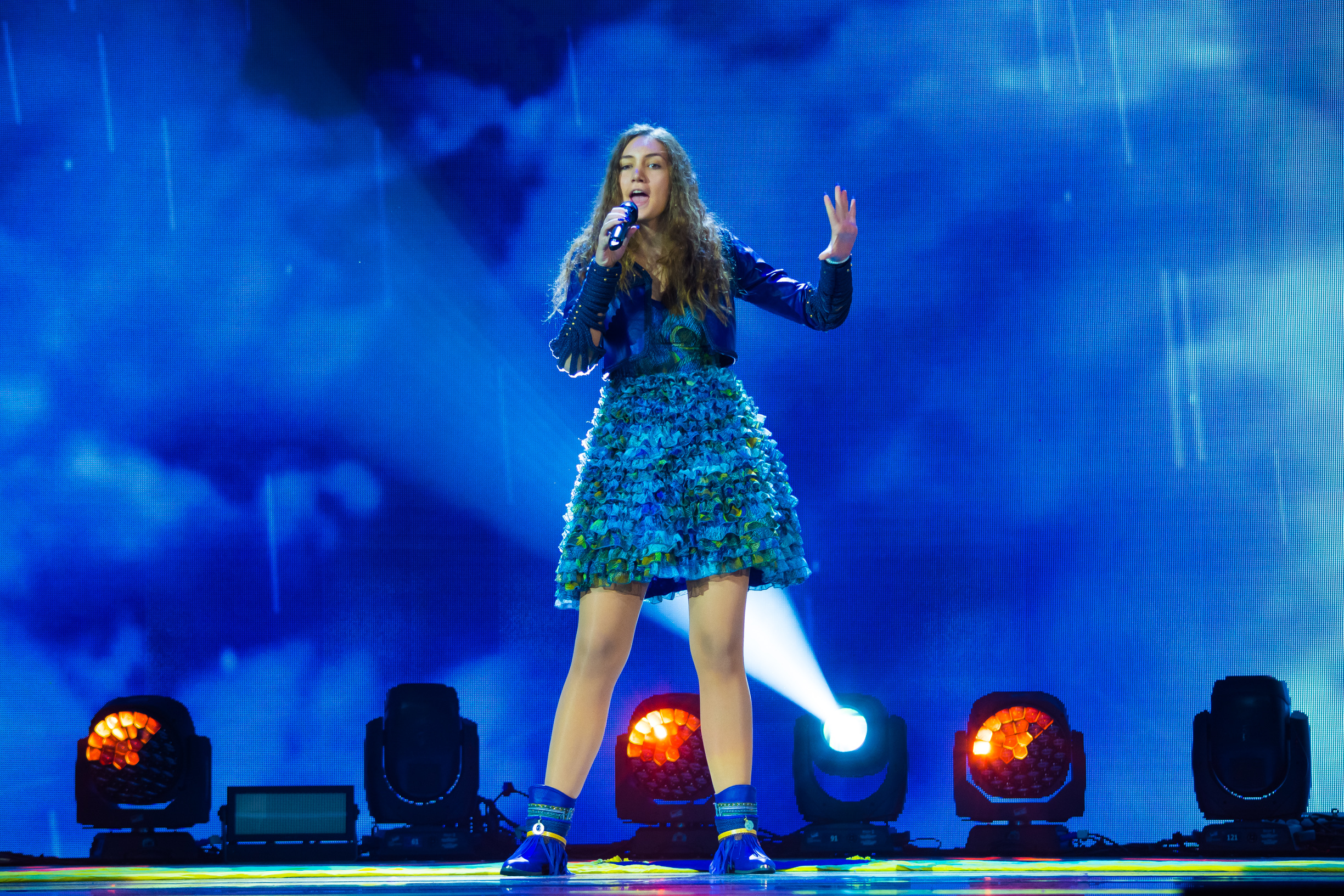 Яна Миркович на сцене Детского Евровидения 2015 («Армеец», София) во время генеральной репетиции